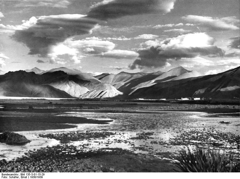 Gyantseebene, Abendstimmung mit Iris und Moor